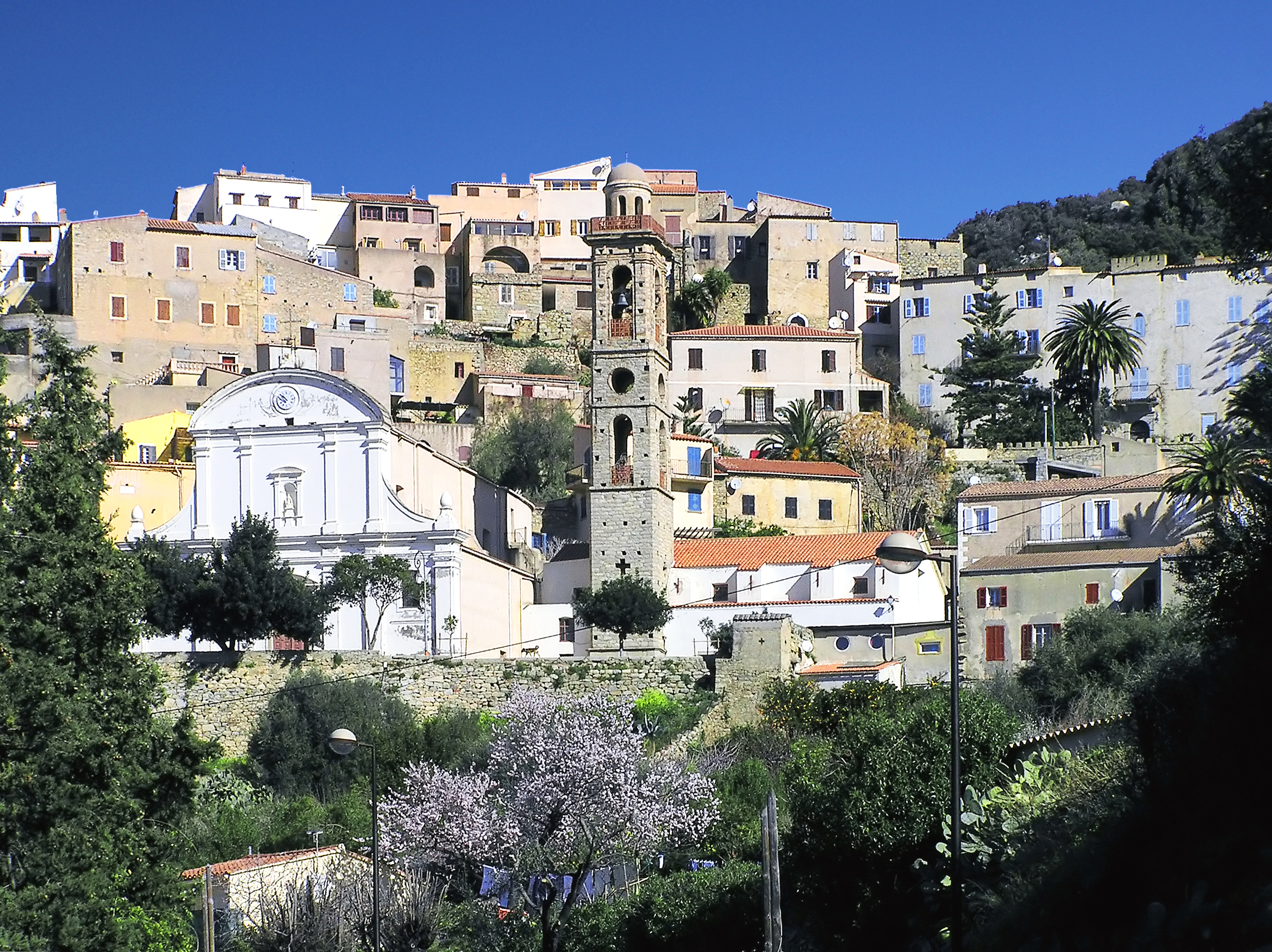 Lumio - Le village